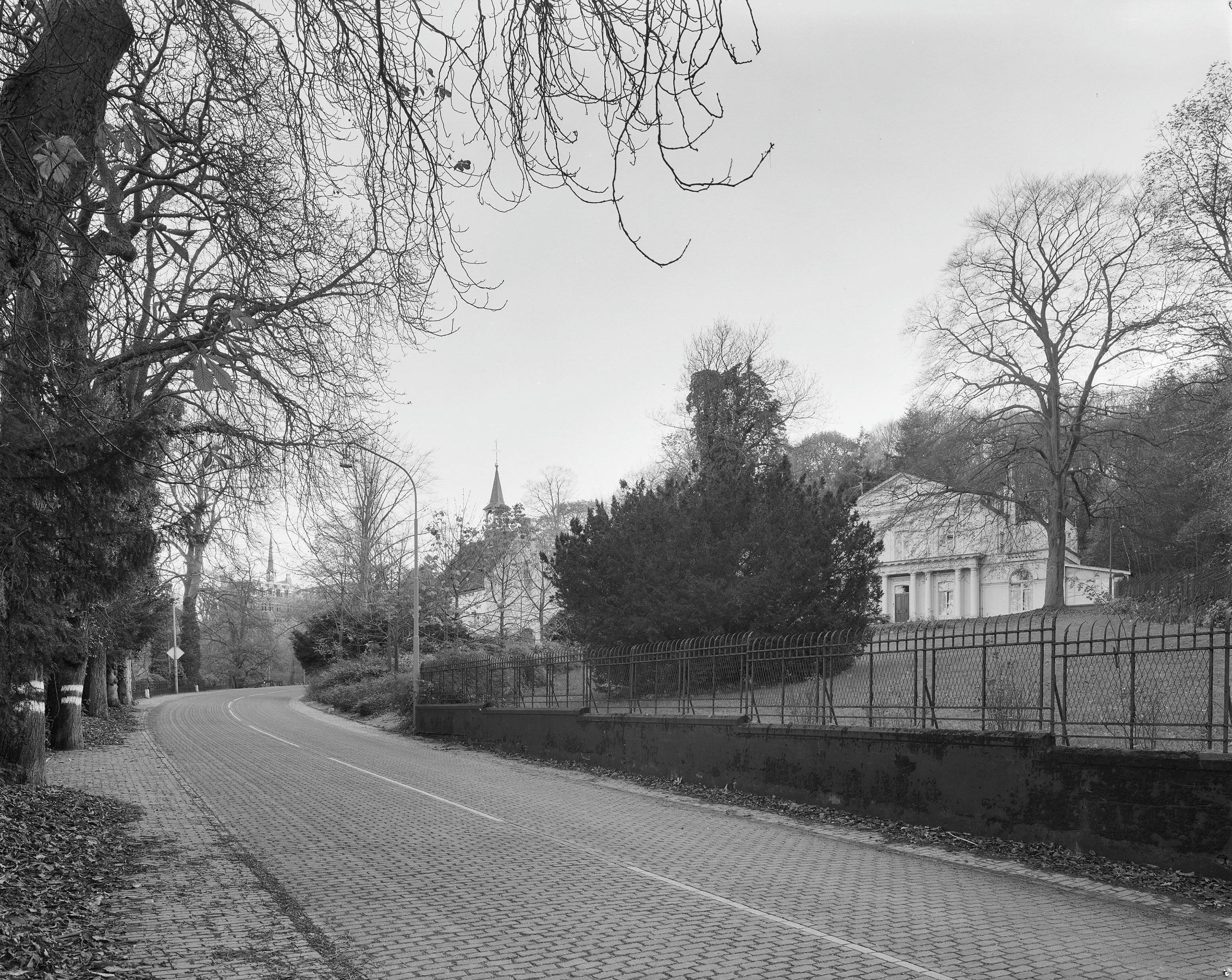 Schoonoord: Landhuis met park rondom, straatweg op de voorgrond